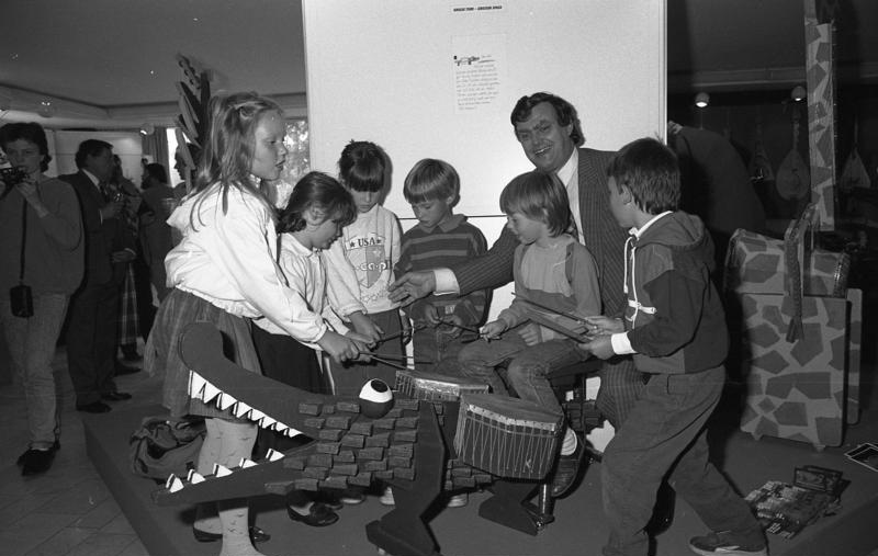 28.7.1987 Der Parlamentarische Staatssekretär beim Bundesminister für Jugend, Familie, Frauen und Gesundheit, Dr. Anton Pfeifer, eröffnet die Ausstellung "Musik aus dem Bauch von Jumbo" mit 150 von Kindern gebastelten Musikinstrumenten, die das Kindermuseum "Schaufenster für Schule und Kinderkunst" in Wuppertal zur Verfügung gestellt hat - im Bundesministerium für Jugend, Familie, Frauen und Gesundheit.